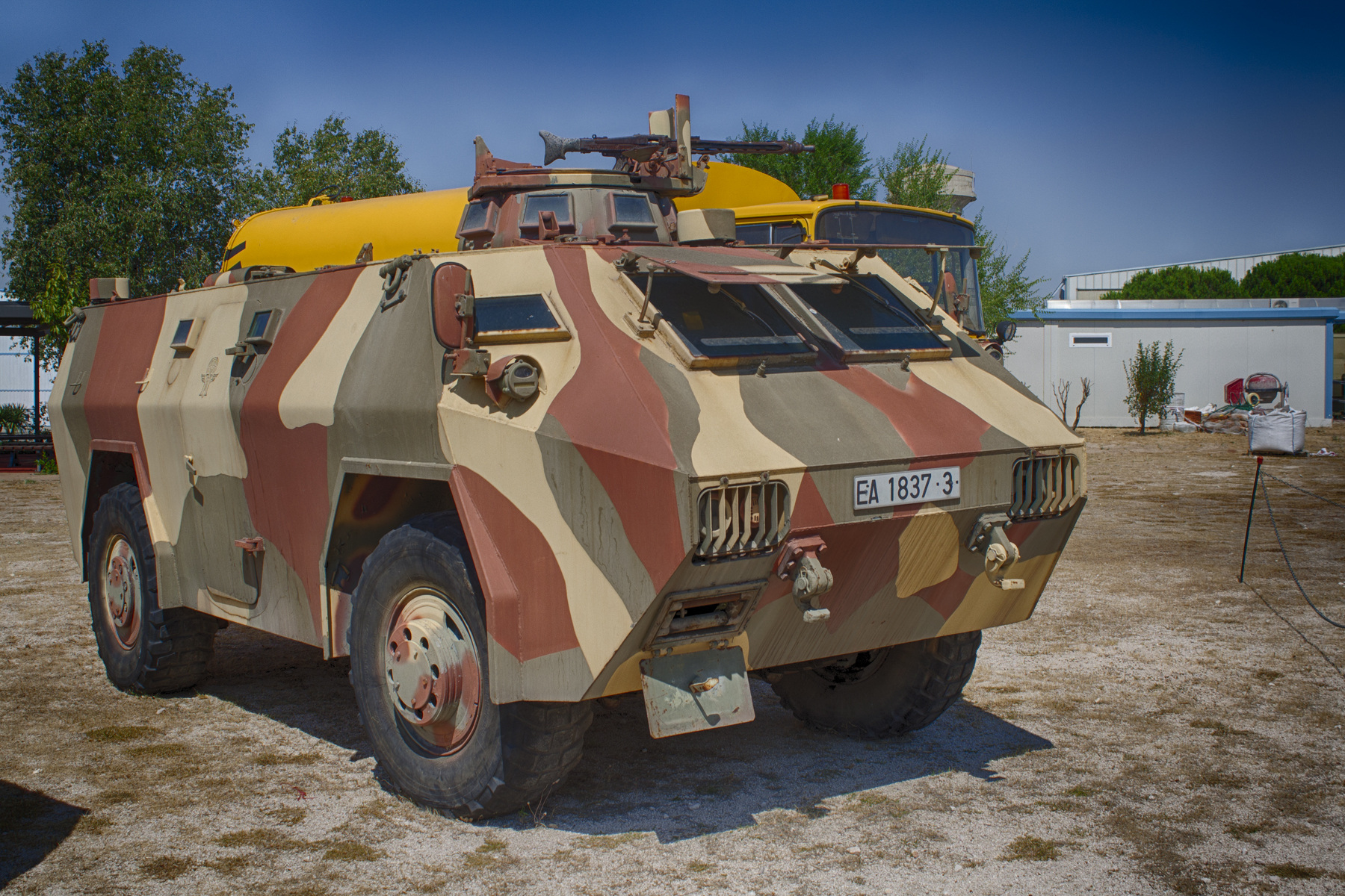 Museo de Aeronáutica y Astronáutica de España (Museo del Aire) Madrid Comunidad de Madrid España